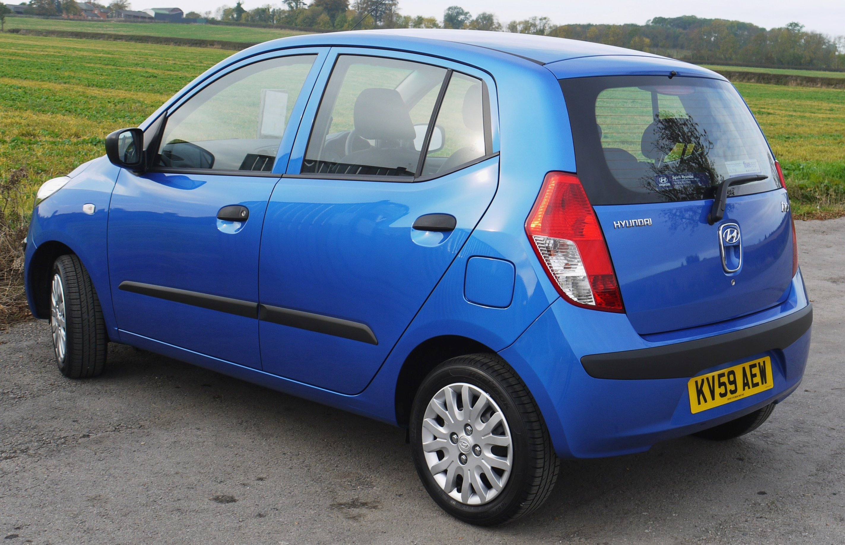 Panasonic G1 14-45 Lens